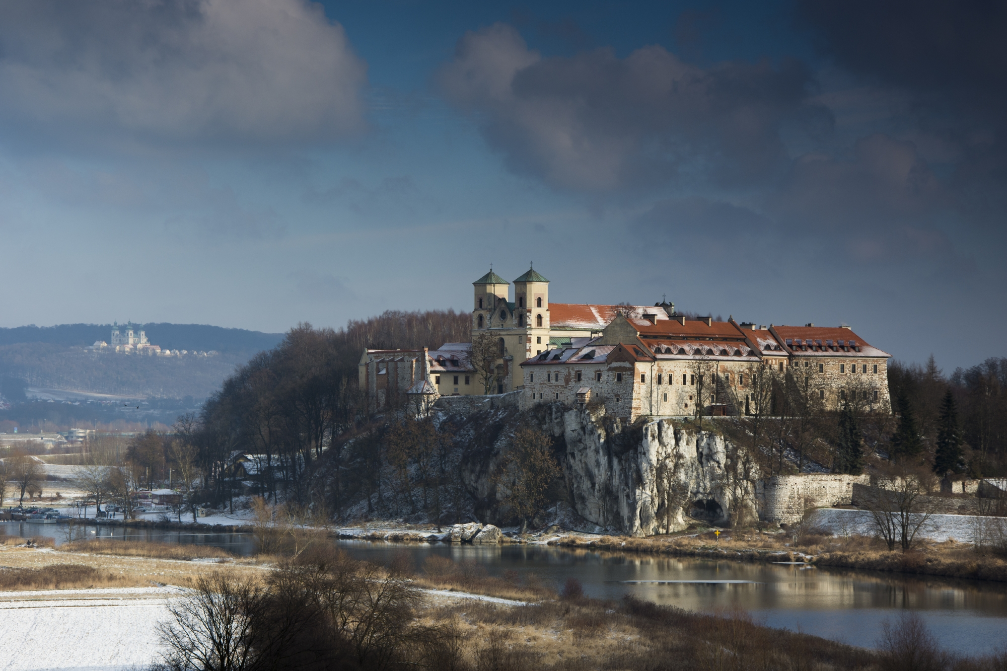 Kraków, zespół klasztorny benedyktynów, XI, XIV/XV, 1618-1622